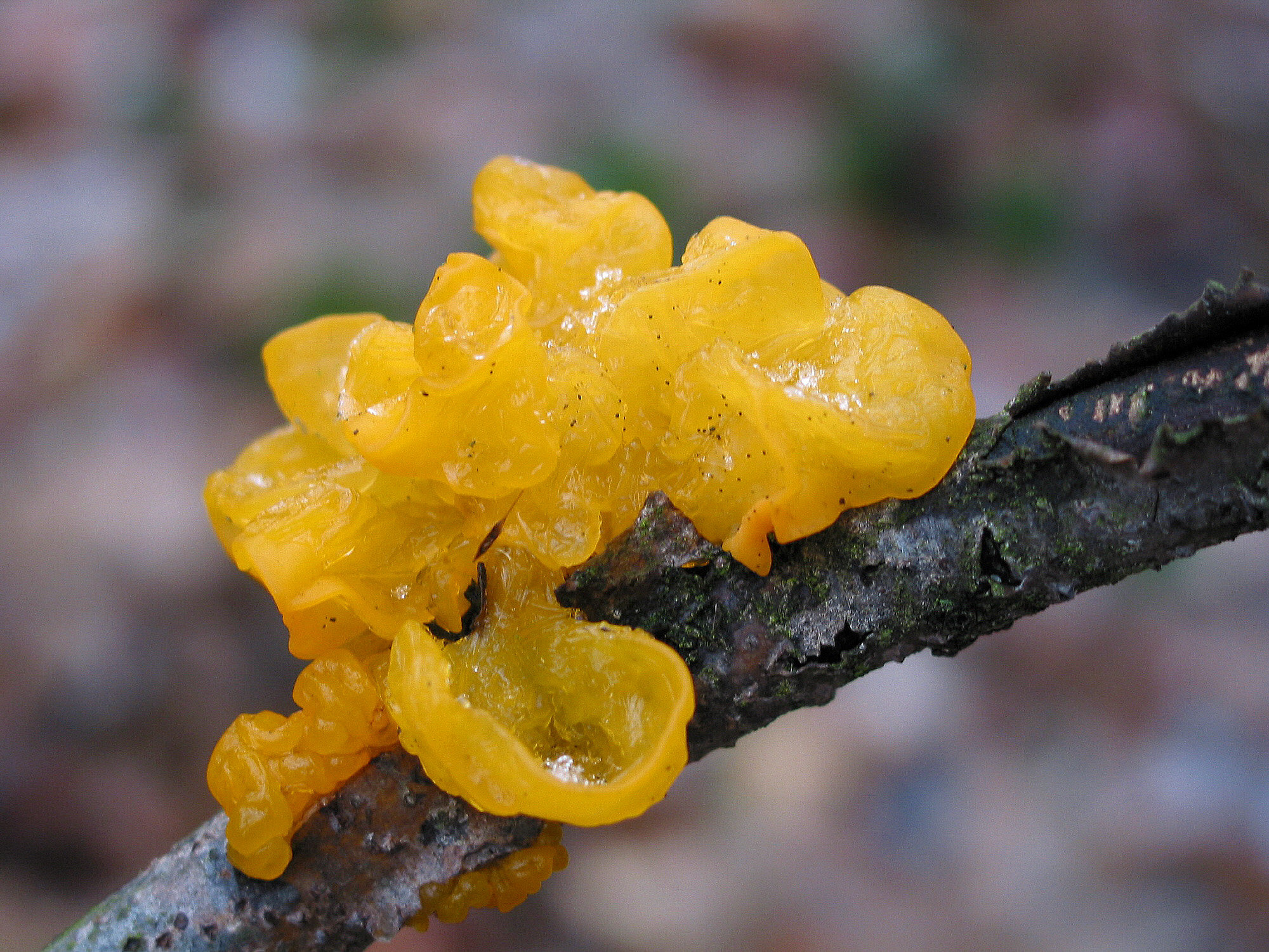 Trémelle mésentérique Tremella mesenterica, Havré (Belgique/Belgium), forêt de hêtres et de chênes./ beeches and oaks forest.